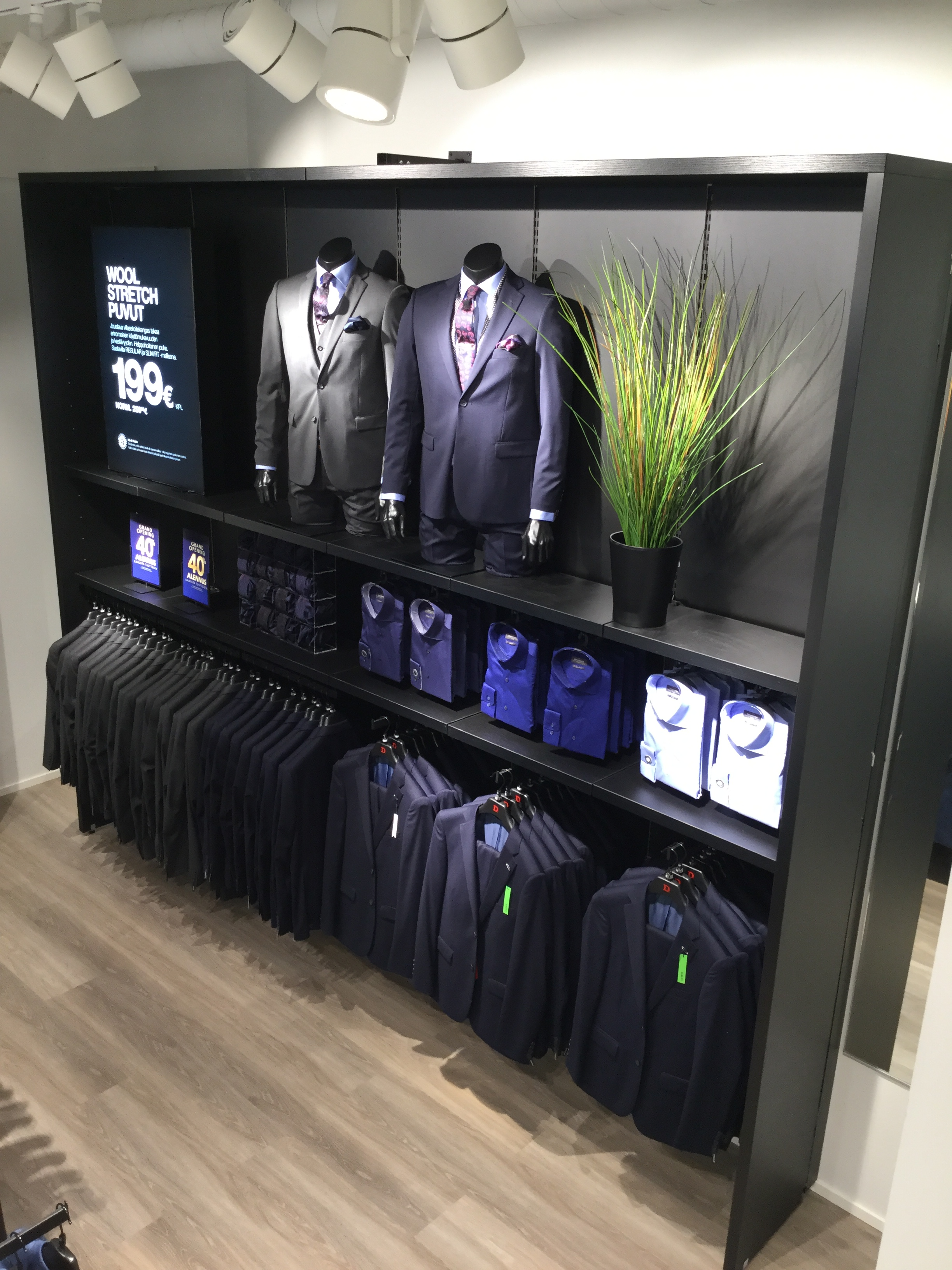 Pukuosasto Dressmann-myymälässä.